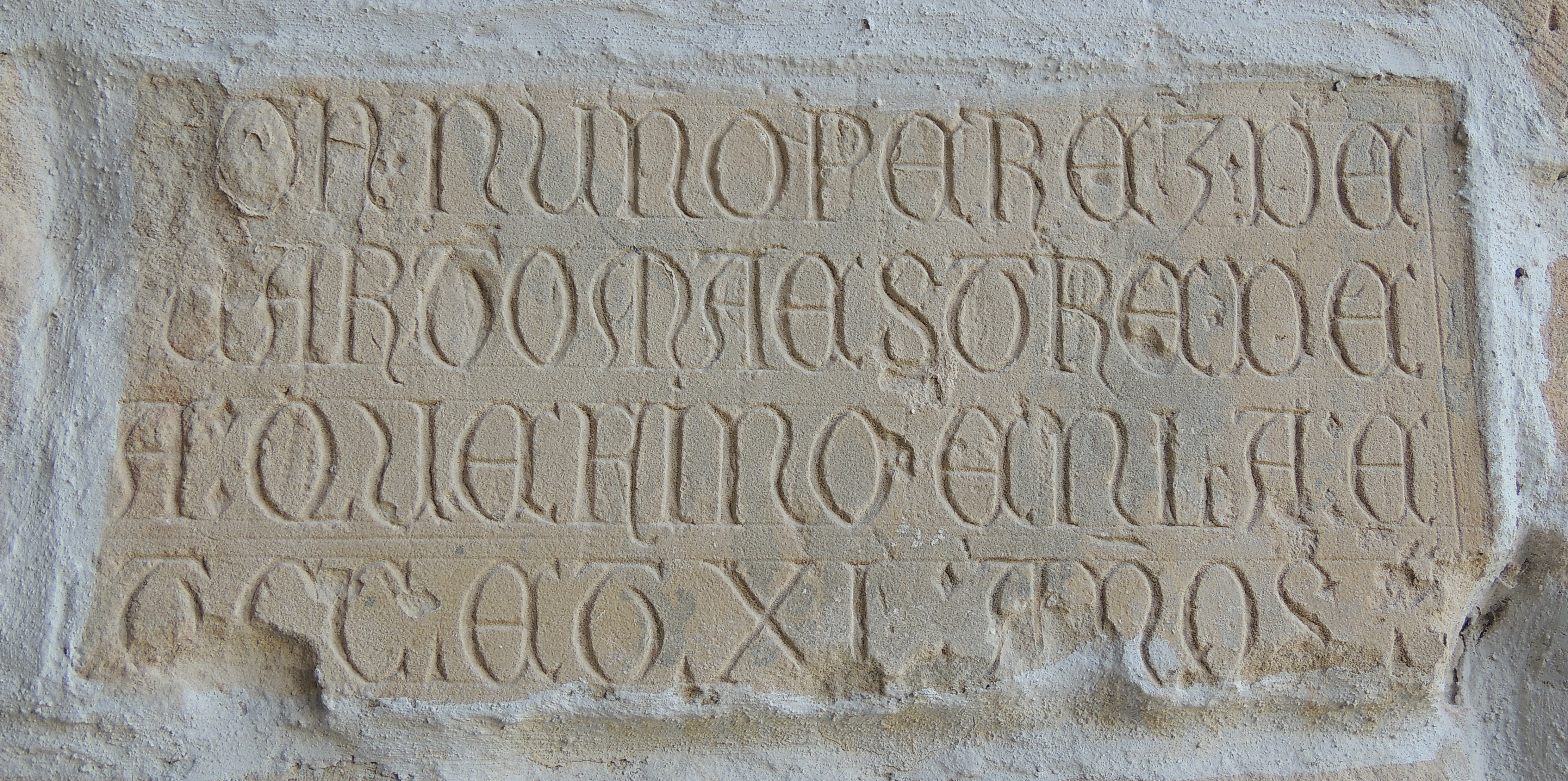 Epitafio de Nuño Pérez de Quiñones en la ventana derecha entre la sala capitular y el claustro